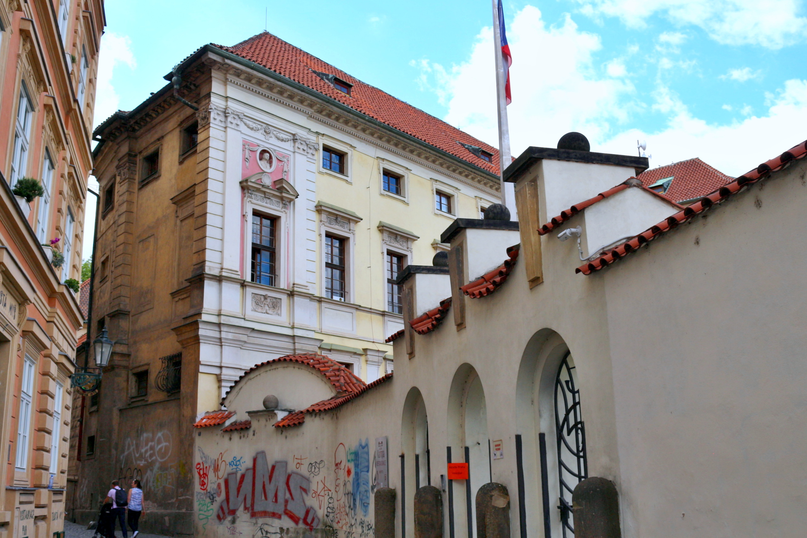 Palác Michnů z Vacínova